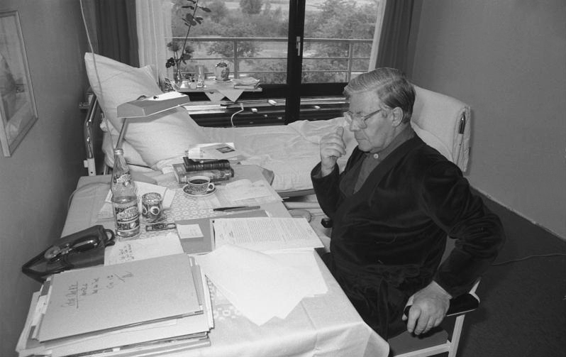 Bundeskanzler Schmidt im [Zentralkrankenhaus] der Bundeswehr in Koblenz